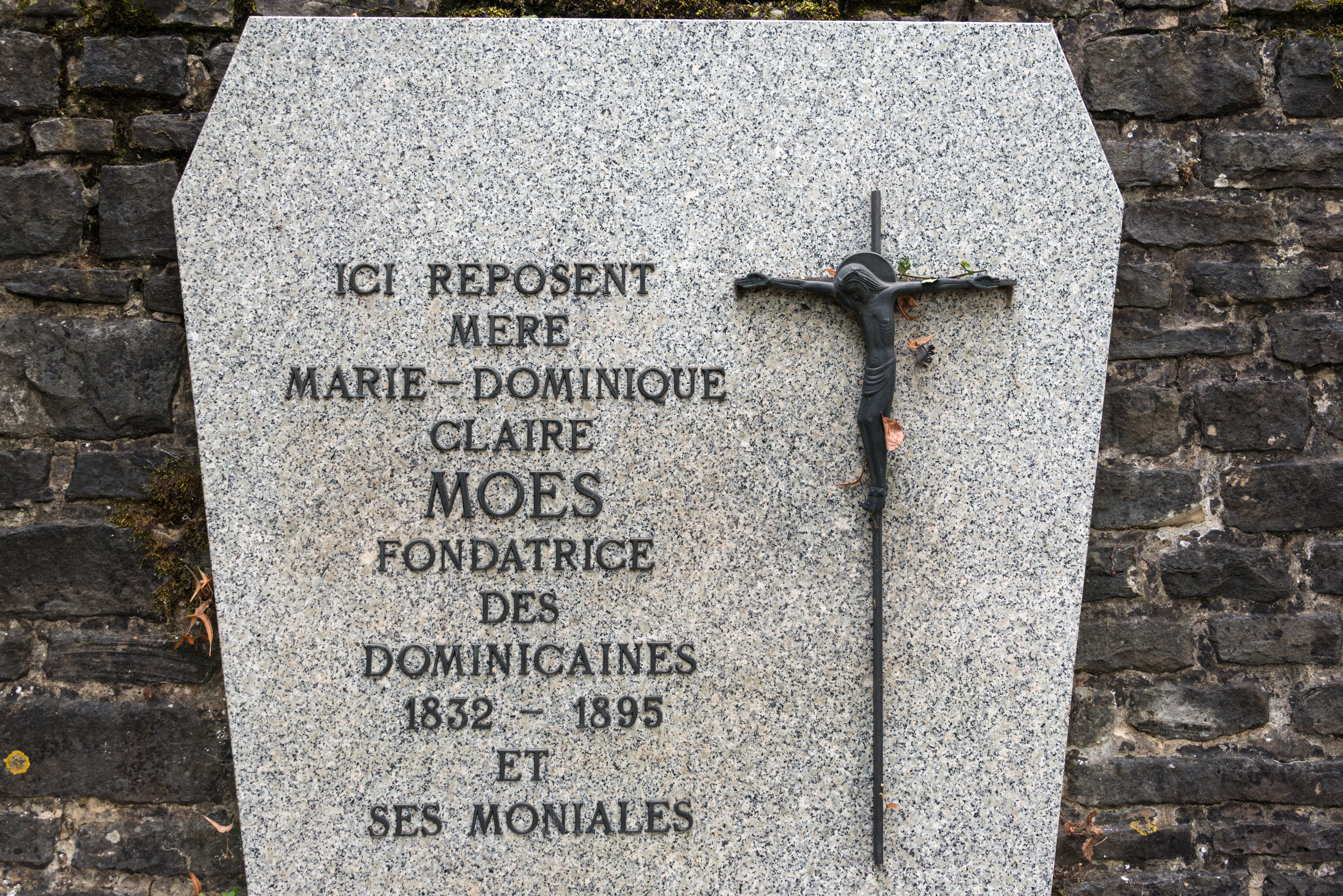 D'Graf vun der "Klara Wupp" an hiren Nonnen um Nikloskierfecht.